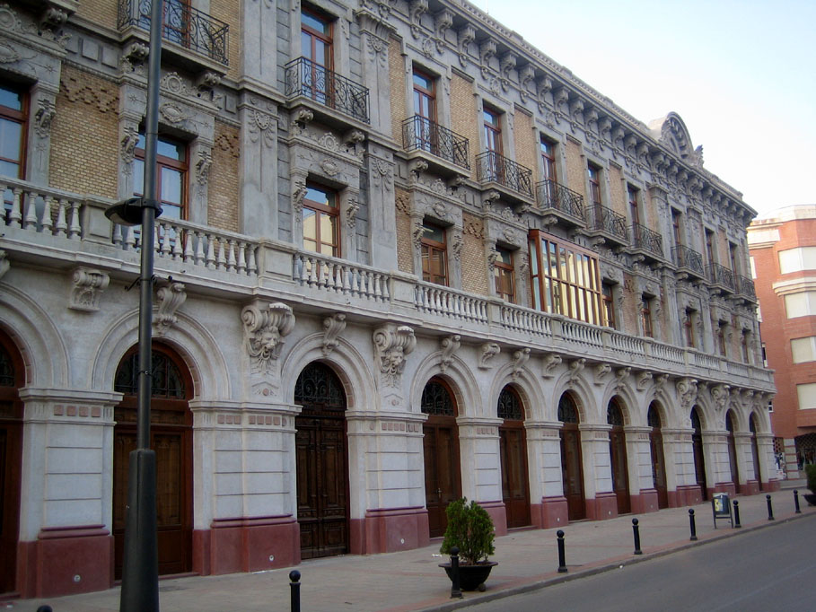 Casa del Piñón de La Unión (Murcia). Edifio del arquitecto Pedro Cerdán de 1899.